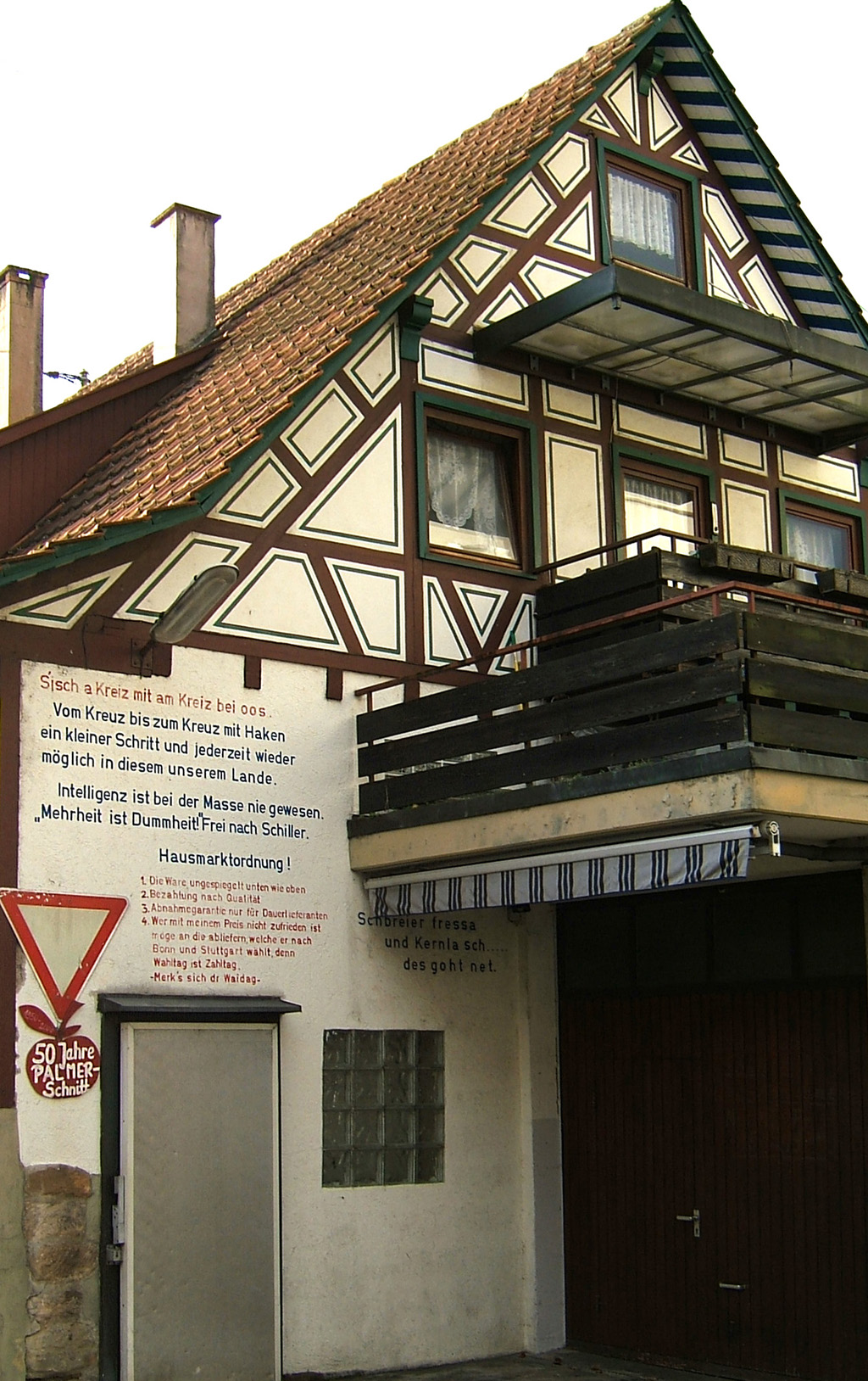 Das Haus von Helmut Palmer in Remshalden-Geradstetten in Deutschland. Das Fachwerkhaus ist über und über mit Parolen, Statements, Daten, Wappen und anderem geschmückt. Einige Zitate: "Unruhe ist erste Bürgerpflicht""Lieber Stein des Anstosses als anstössig""Ein kleiner Spatz wies Amtsleuten den Weg""Eine geniale Leistung des Schneiders von Ulm vom simplen Volk verkannt und verspottet""Dommheit dui isch so: selbr merkt mr nex drvo""Und vergib ihnen nicht, denn sie wissen, was sie tun"